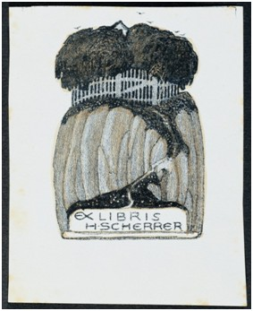 Ex libris Hedwig Scherrer, Farblithographie